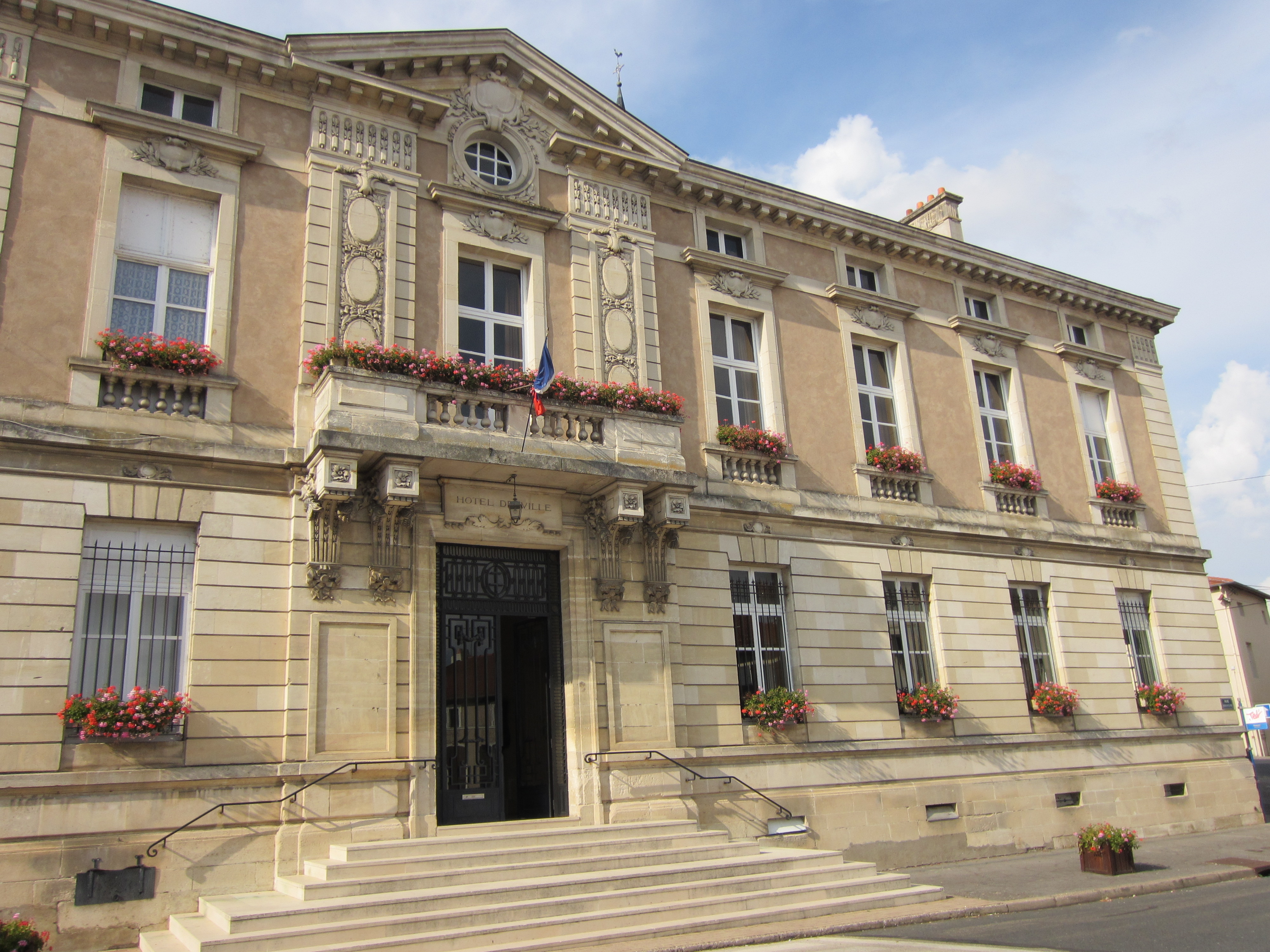 Description mairie Thiaucourt mairie Thiaucourt